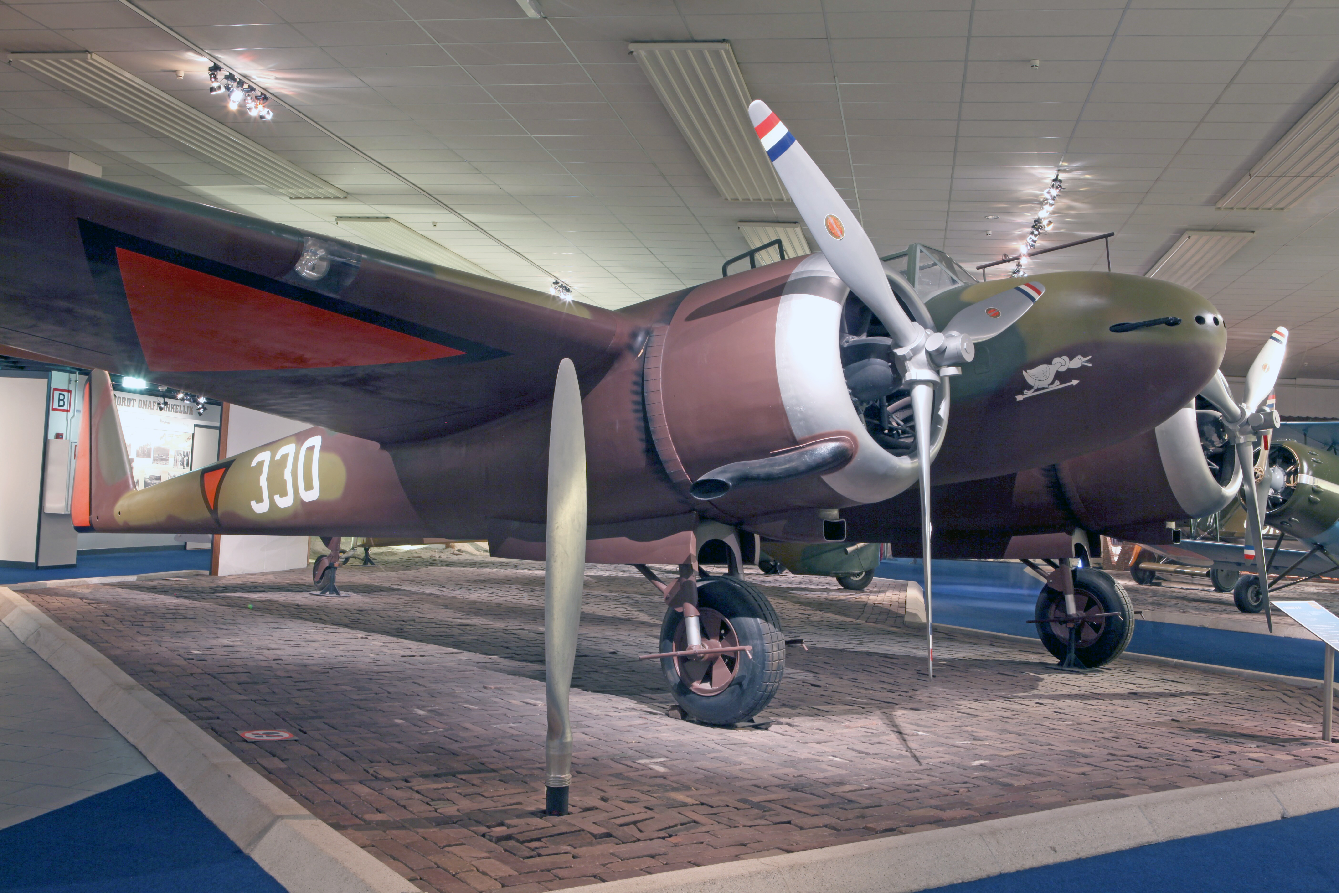 Fokker G-1A